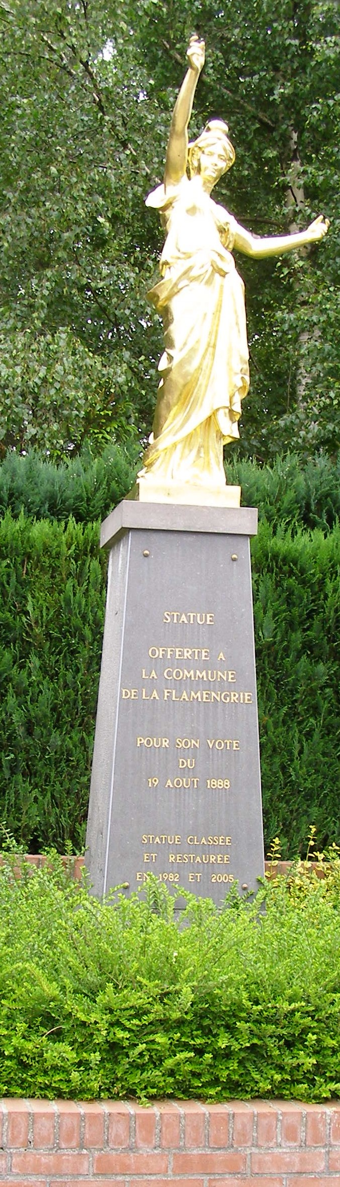 Statue du vote du 19 Août 1888.